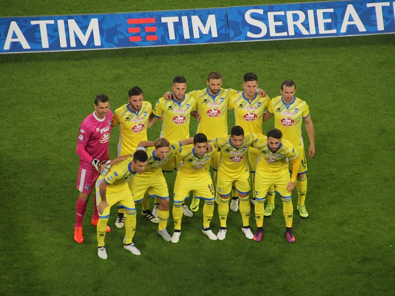 Formazione iniziale del Pescara allo Juventus Stadium.